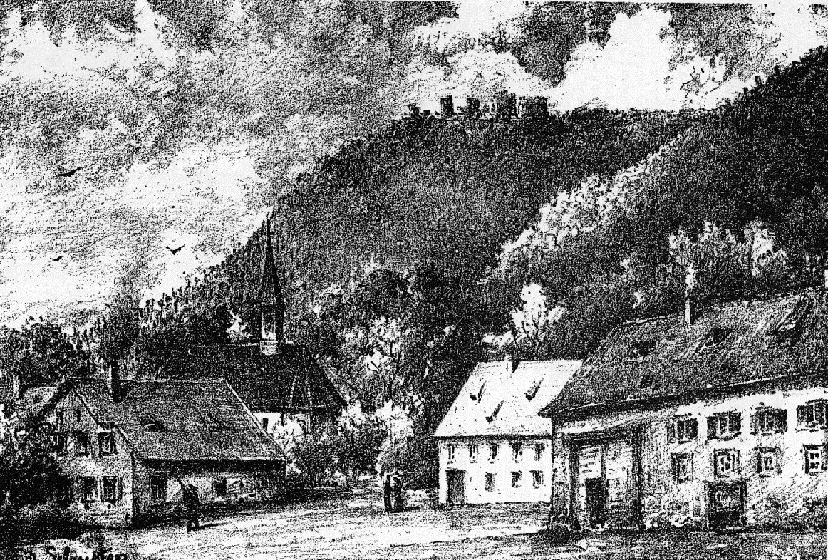 Blick auf die Küssaburg von Küßnach aus